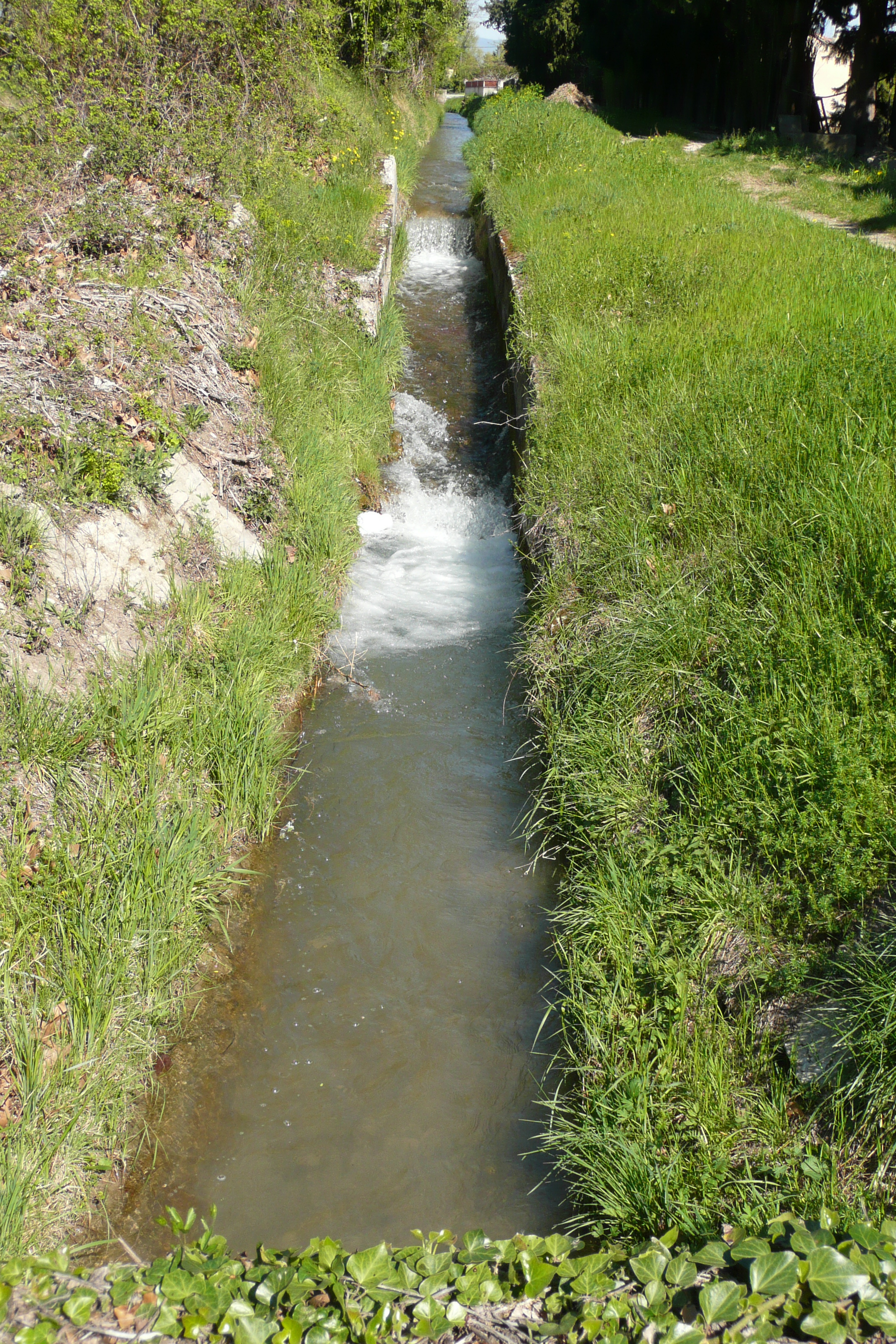 Chute d'eau à la sortie de Monteux.